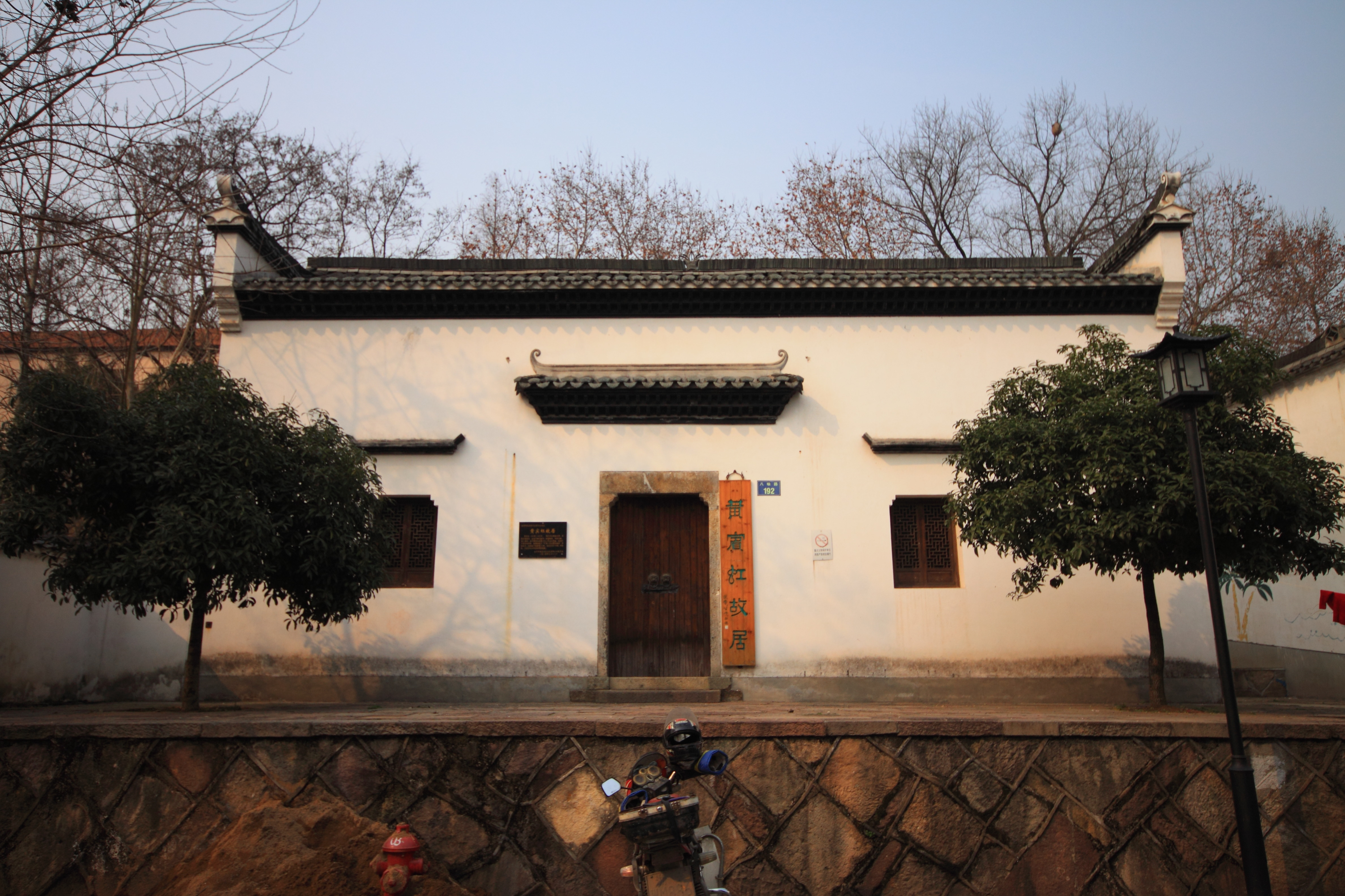 浙江省金华市八咏路192号黄宾虹故居